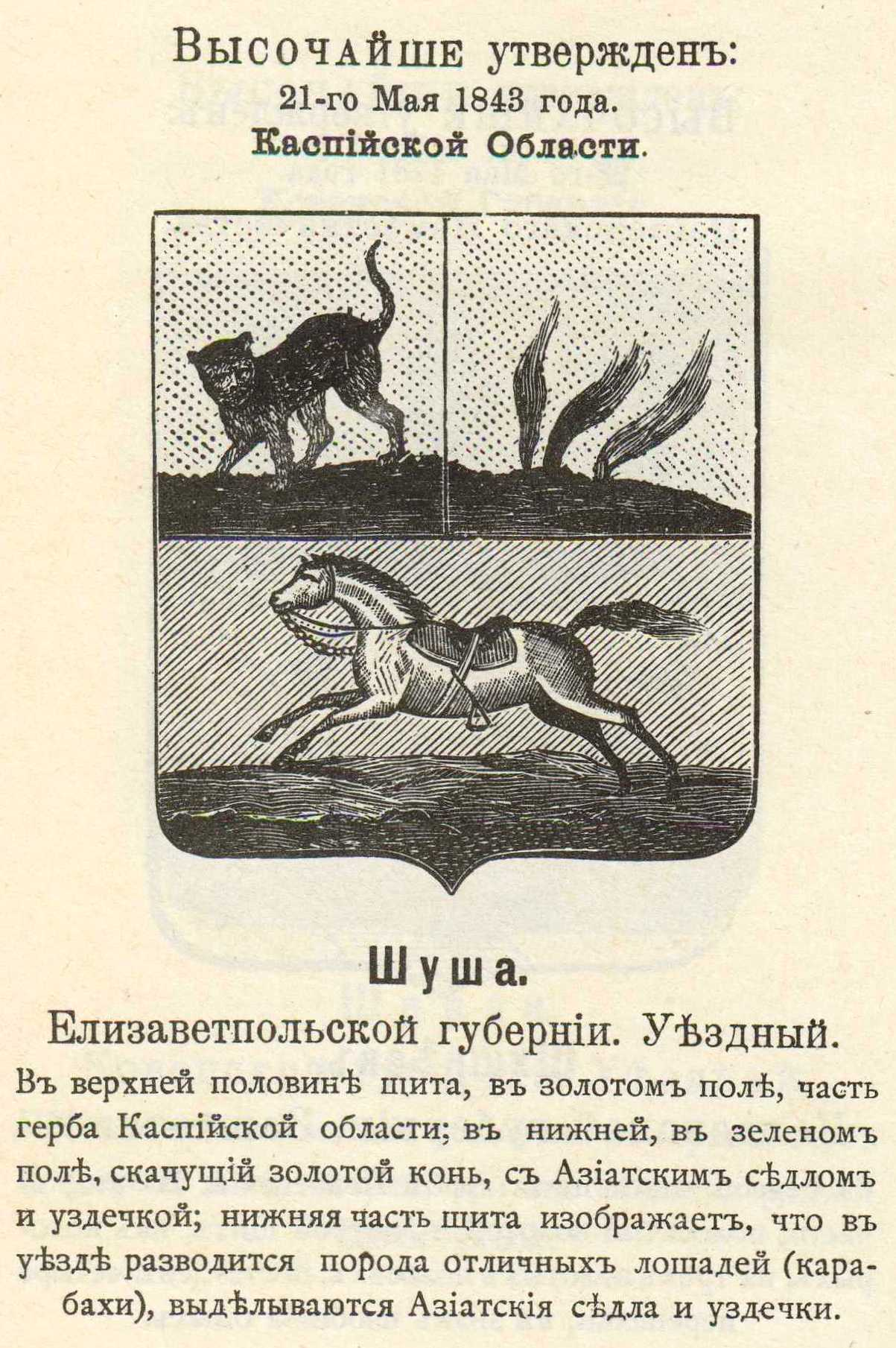 Official Russian Empire coat of arms: Shusha. Герб Российской Империи города Шуша Елисаветпольской губернии (в 1843 - Каспийской Области) с официальным описанием в Гербовнике Винклера. Герб гласный для Карабаха (изображена лошадь породы карабах).